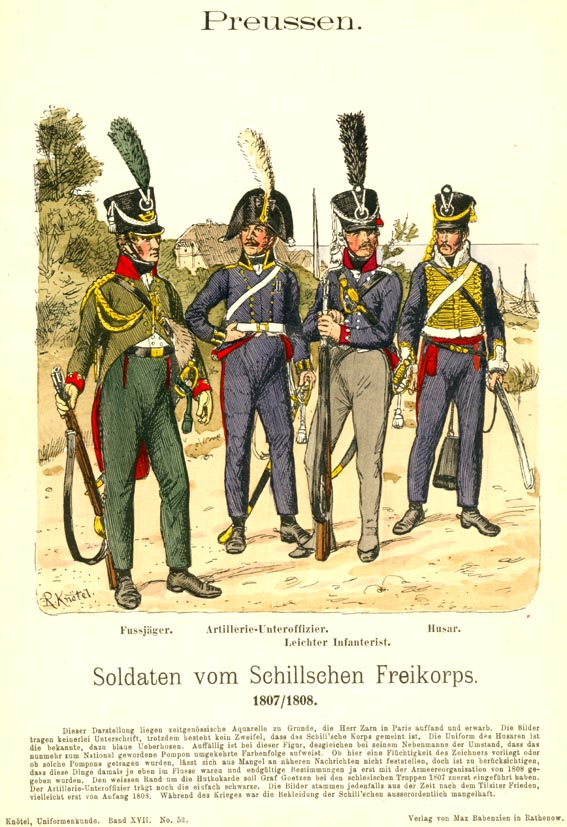 Иллюстрация Рихарда Кнотеля